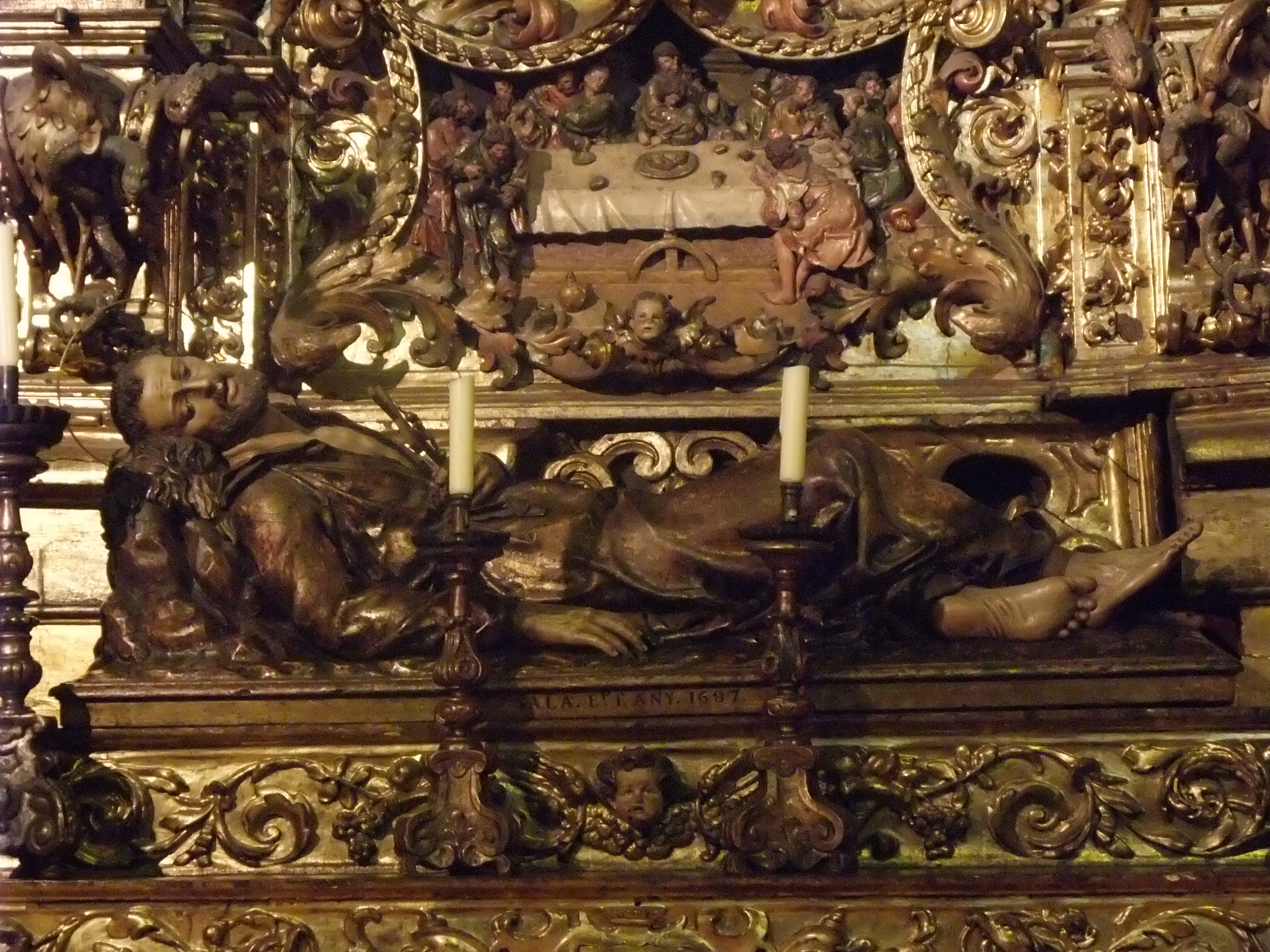 Catedral de Santa Eulalia (XII)-Muerte de San Francisco Javier (Andreu Sala,1687)